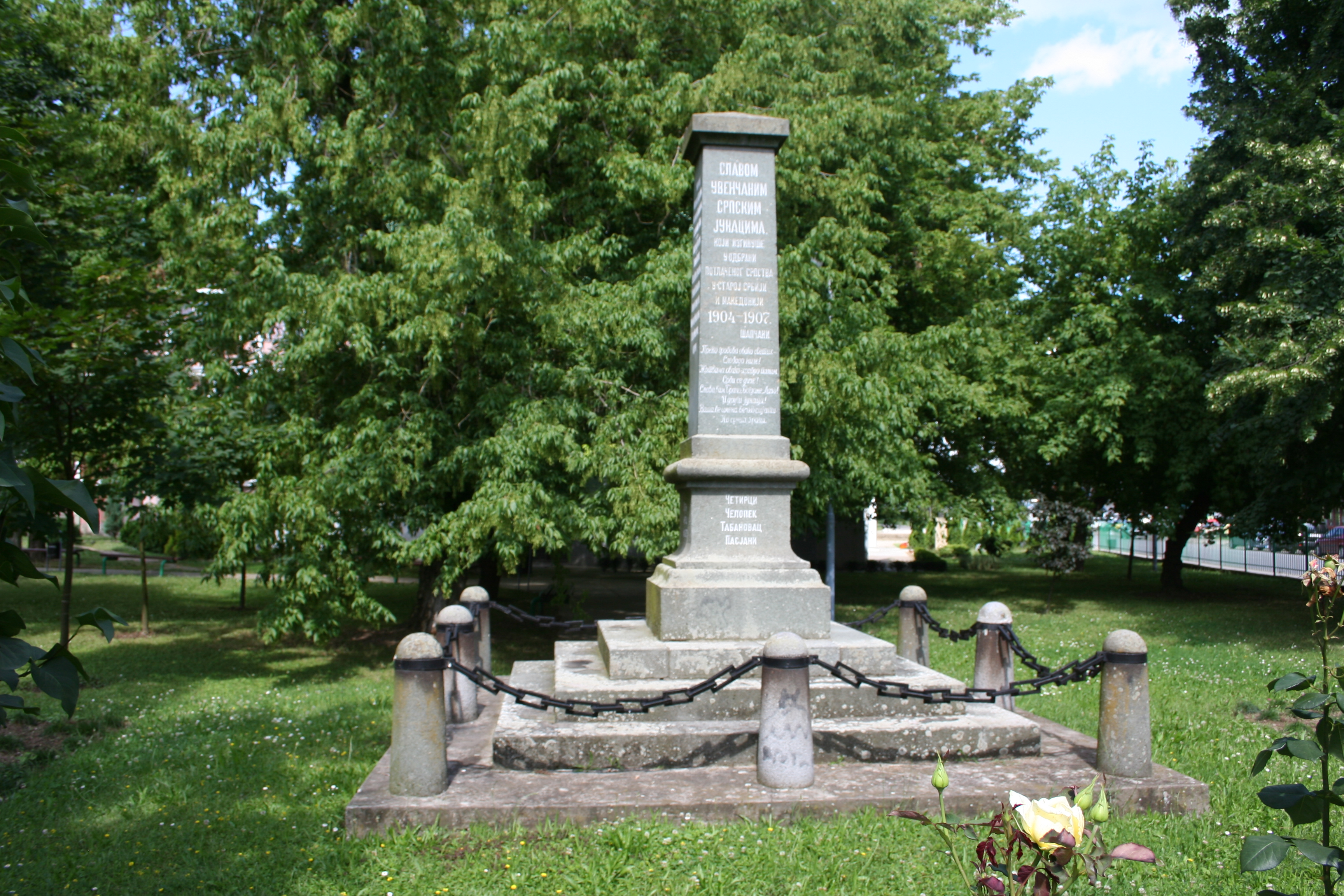 Spomenik poginulim četnicima u Staroj Srbiji i Makedoniji od 1904. do 1907. godine u dvorištu medicinske škole